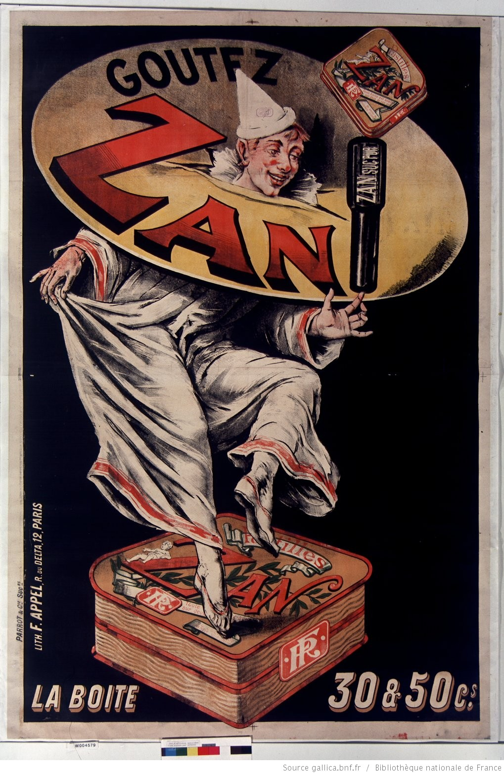 Affiche publicitaire lithographiée pour les produits à base de réglisse de la marque Zan. Imprimé à Paris chez Lith. F. Appel. Format : 148 x 100 cm.